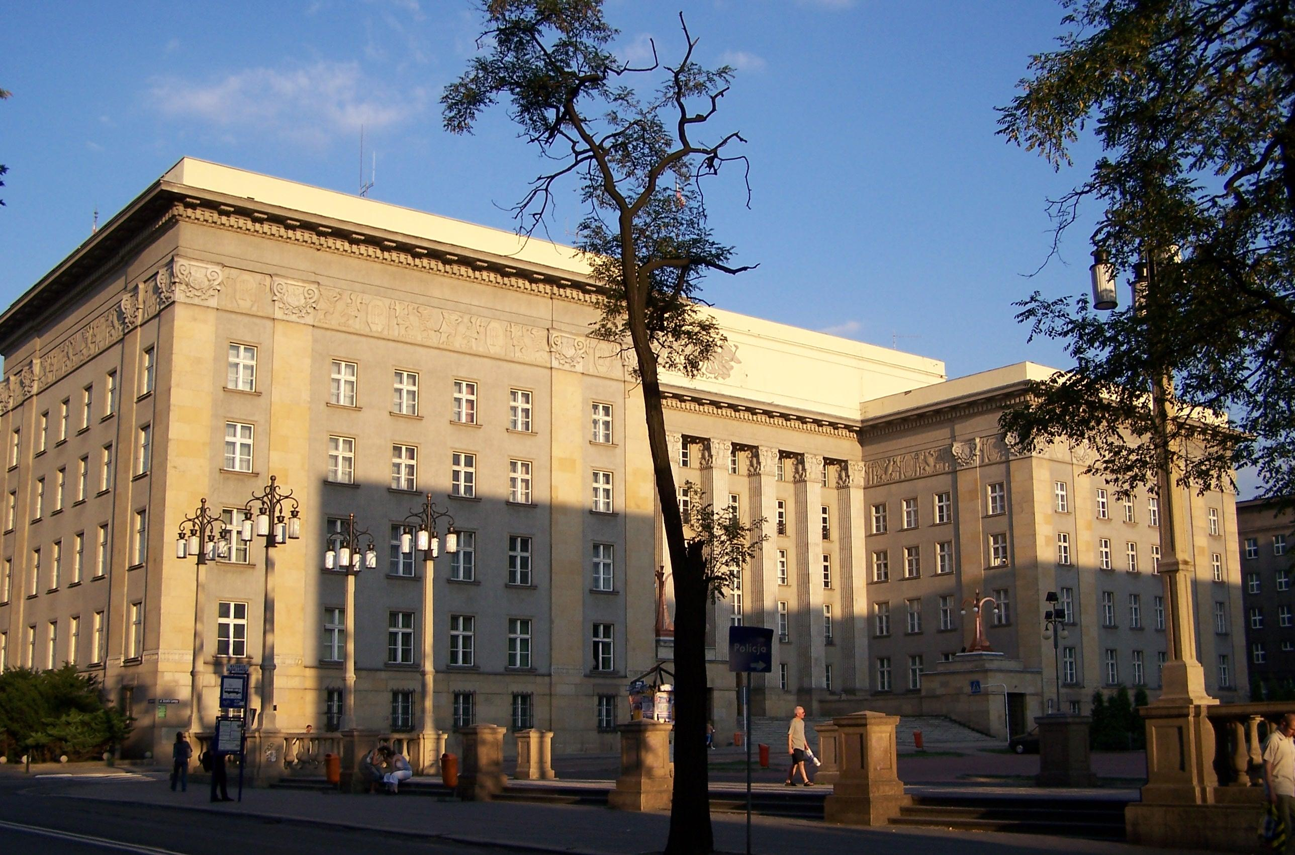 Gmach Sejmu Śląskiego - Urząd Wojewódzki.